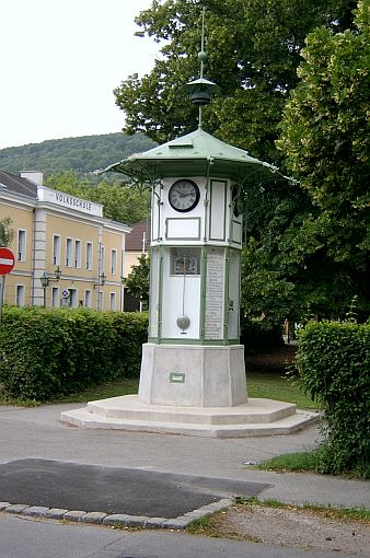 Wetterstation in der Hinterbrühl/Niederösterreich fotografiert:selbst 08/2005